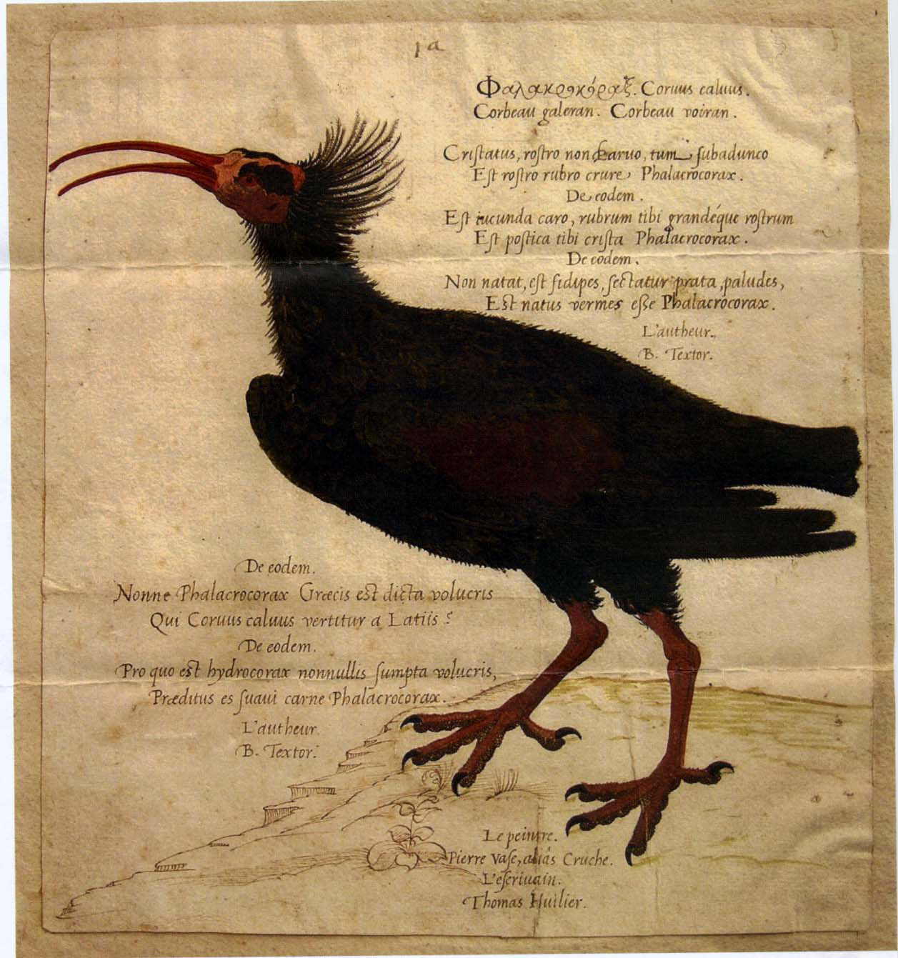 Ibis à tête rouge (« corbeau galeran »), gouache de Pierre Eskrich dans un album de deux cents dessins d’oiseaux. New-York Historical Society.